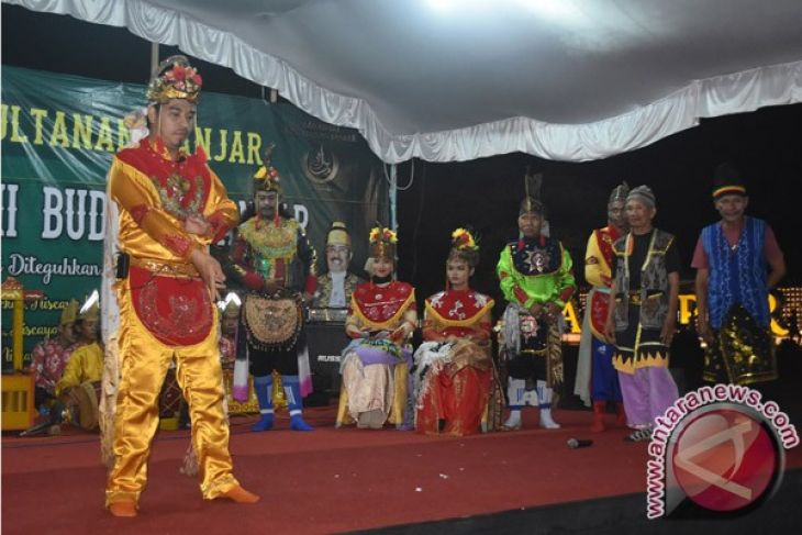 Pertunjukkan Damarwulan Banjarmasin. Gambar di unduh dari AntaraKalsel.